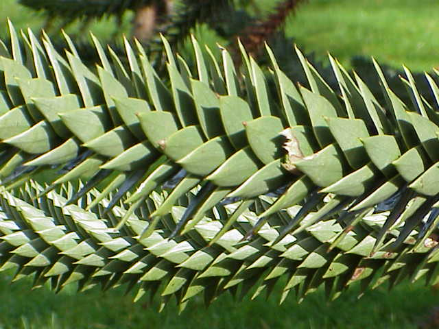 Species: Araucaria araucana Family: Araucariaceae Image No. 5